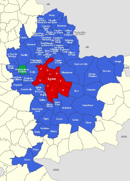 Communes du Grand Lyon, en vert Charbonnières-les-Bains